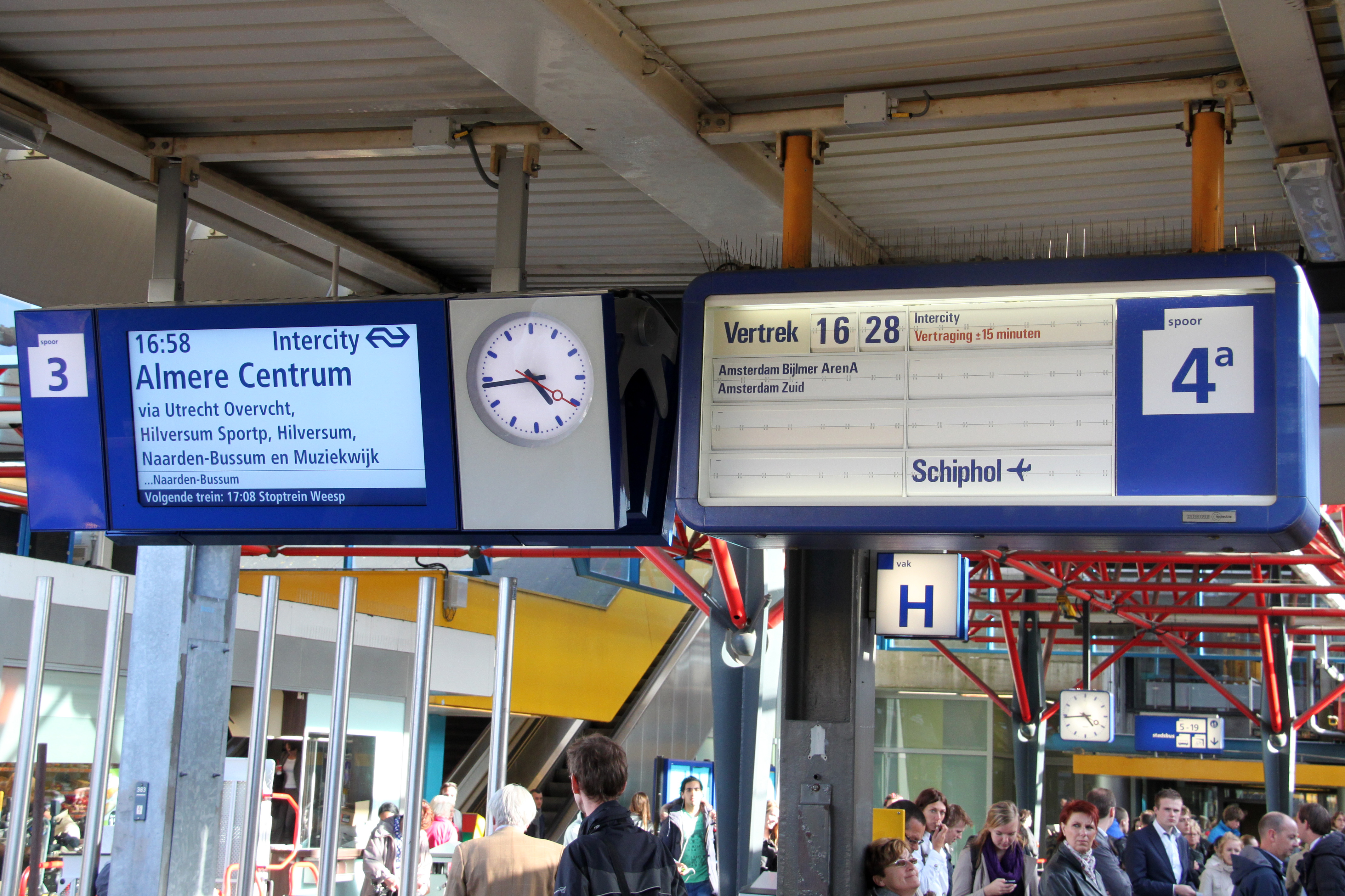 Op Utrecht Centraal in oktober 2011 hingen een oud en nieuw scherm naast elkaar.